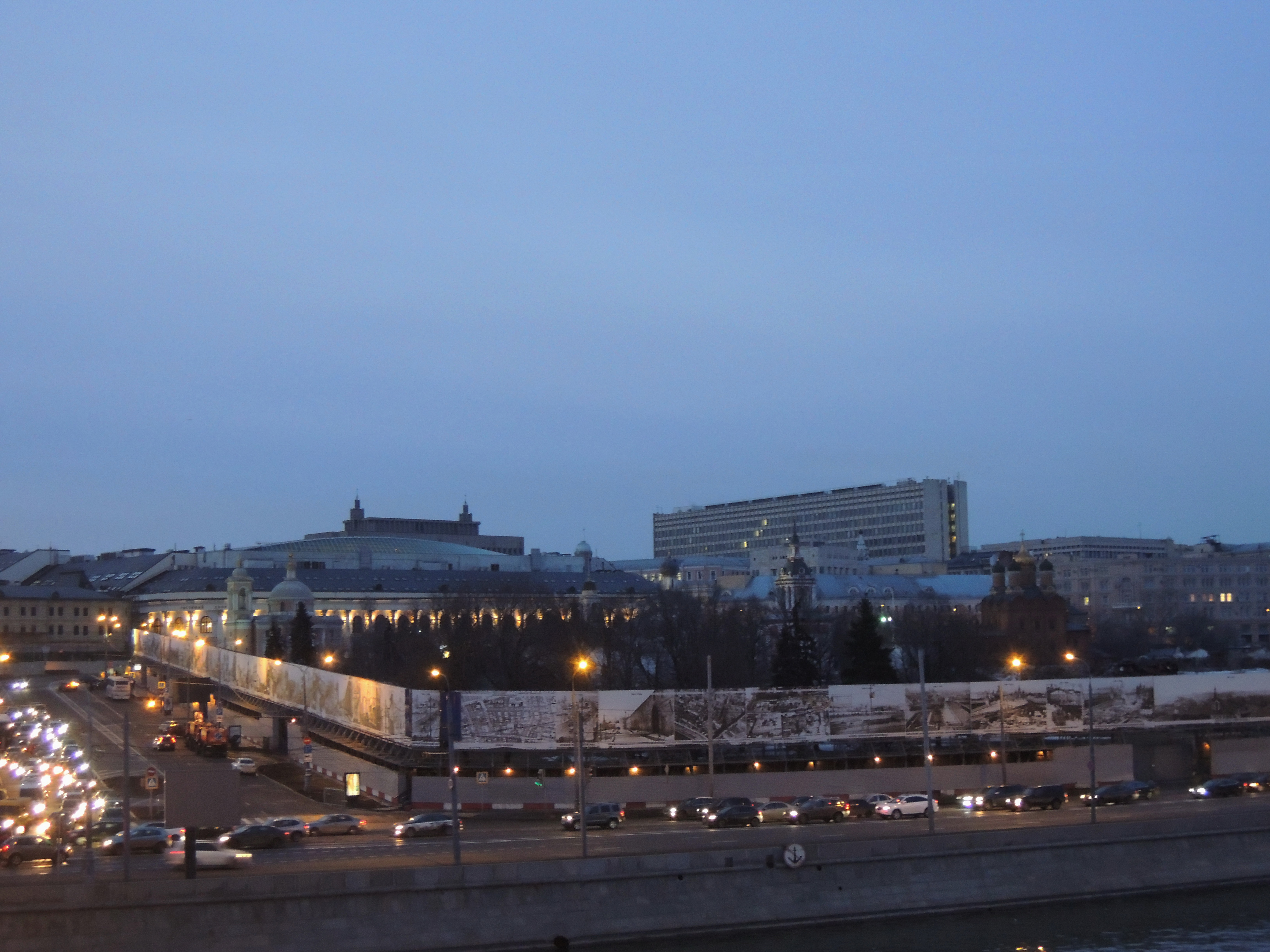 Огороженное место снесенной гостиницы "Россия"